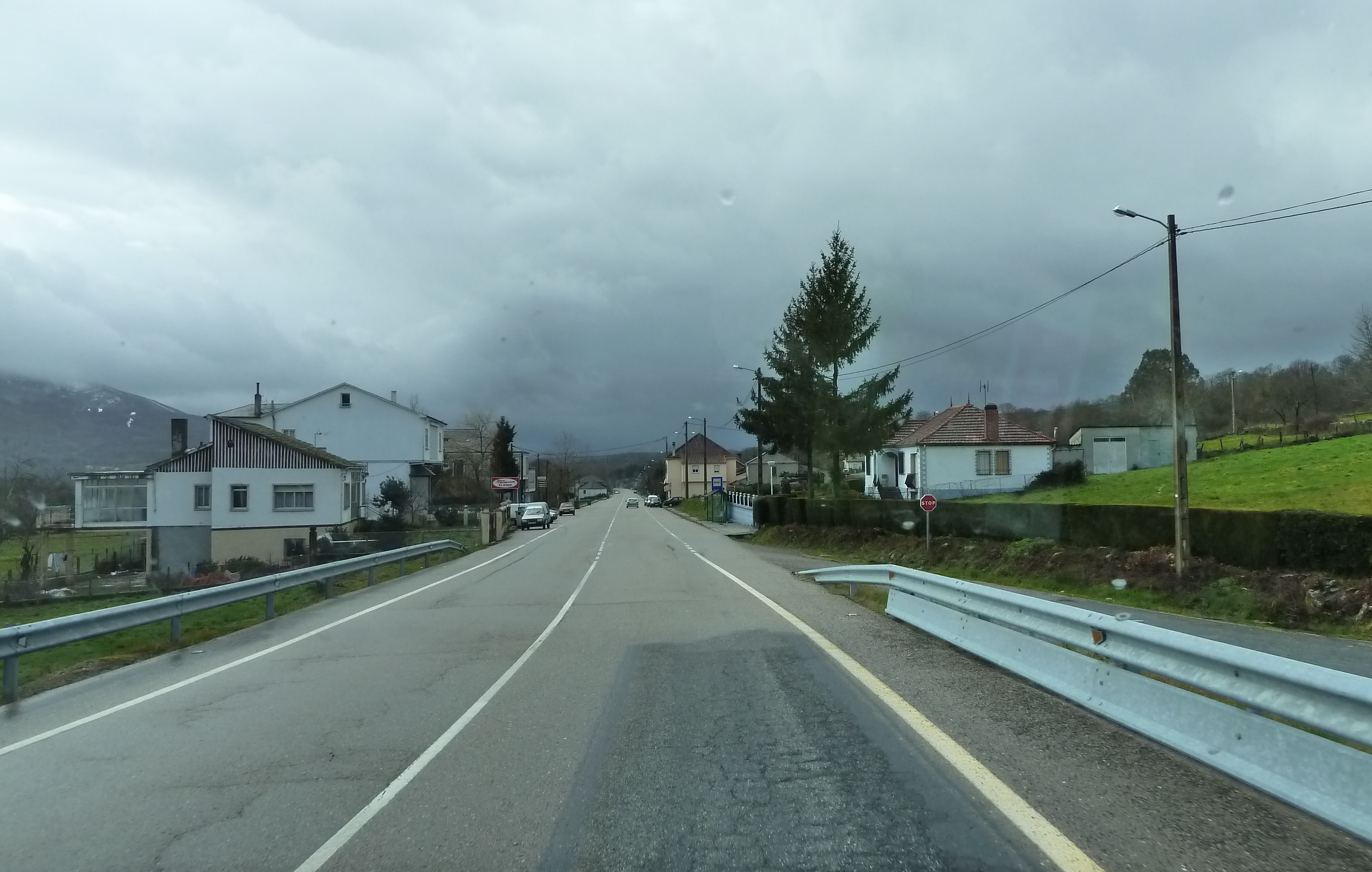 Ver título.